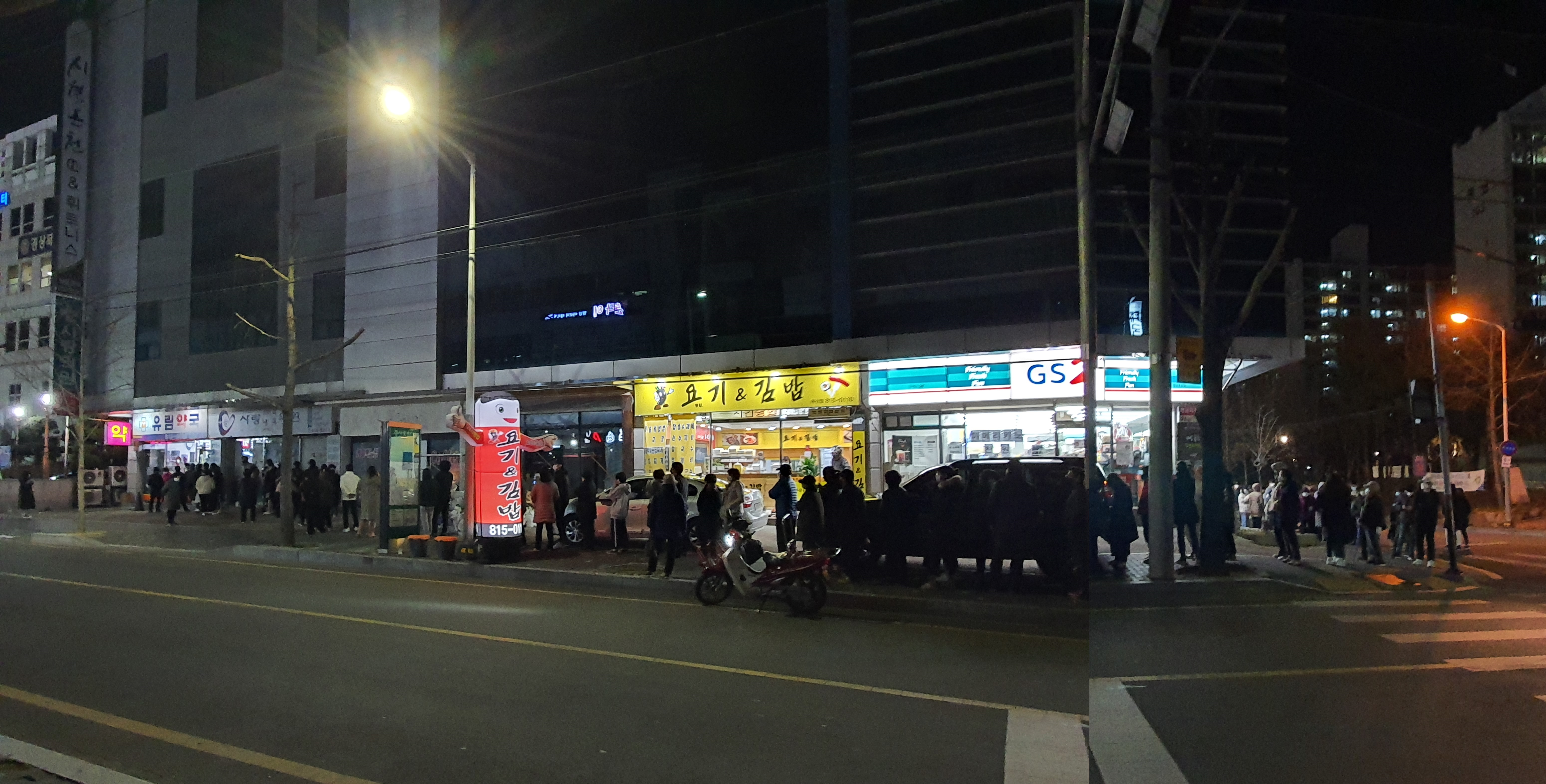 경상북도 경산시의 약국 앞에서 마스크를 구입하기 위해 대기하는 시민들